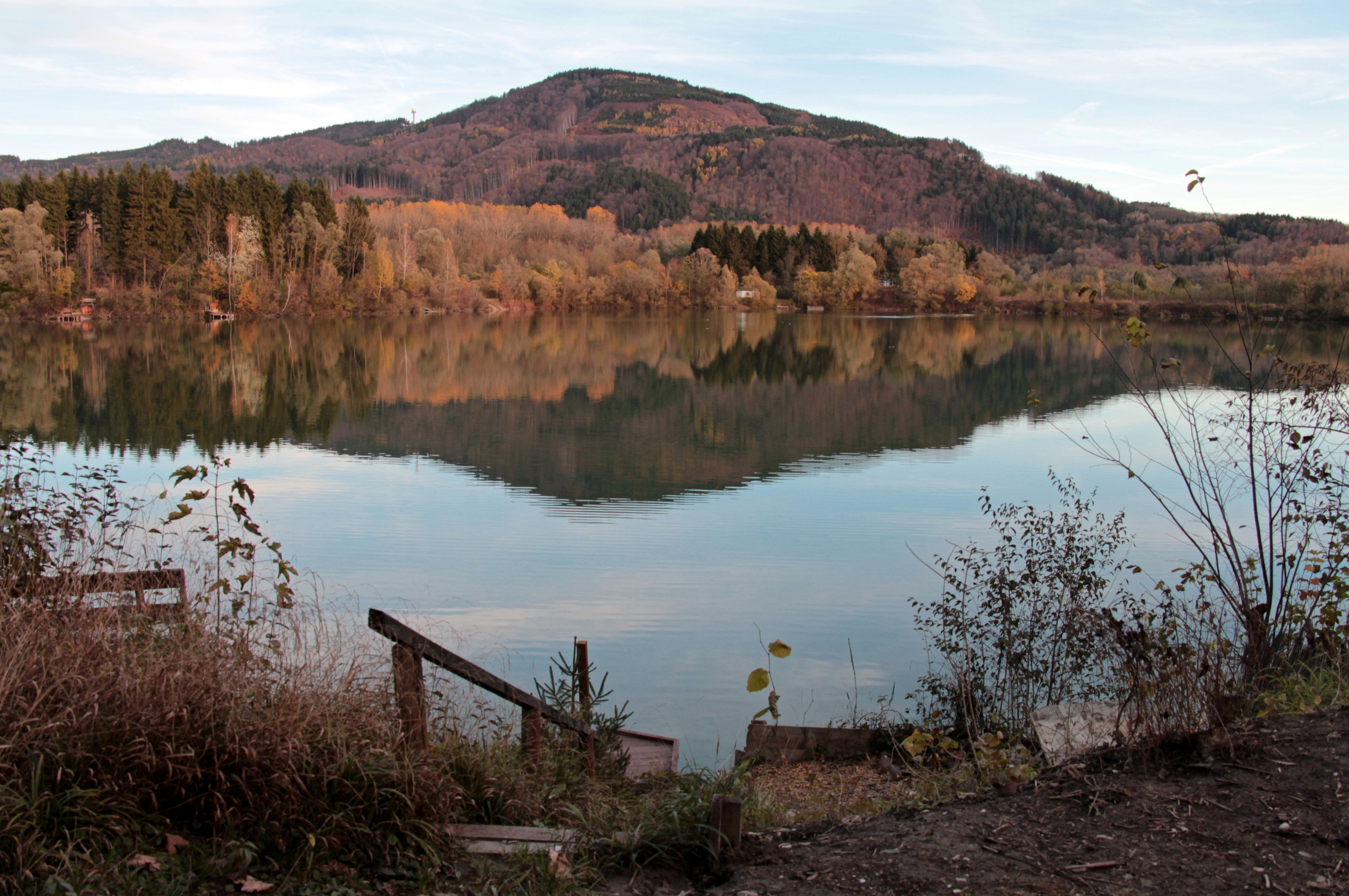 Der Weitwörther Badesee (amtlich: Weitwoerth Badesee) in der Ortschaft Weitwörth, Gemeinde Nußdorf am Haunsberg, Bezirk Salzburg-Umgebung